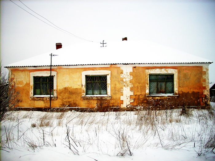 Здание бывшего магазина и медпункта в деревне Доворец